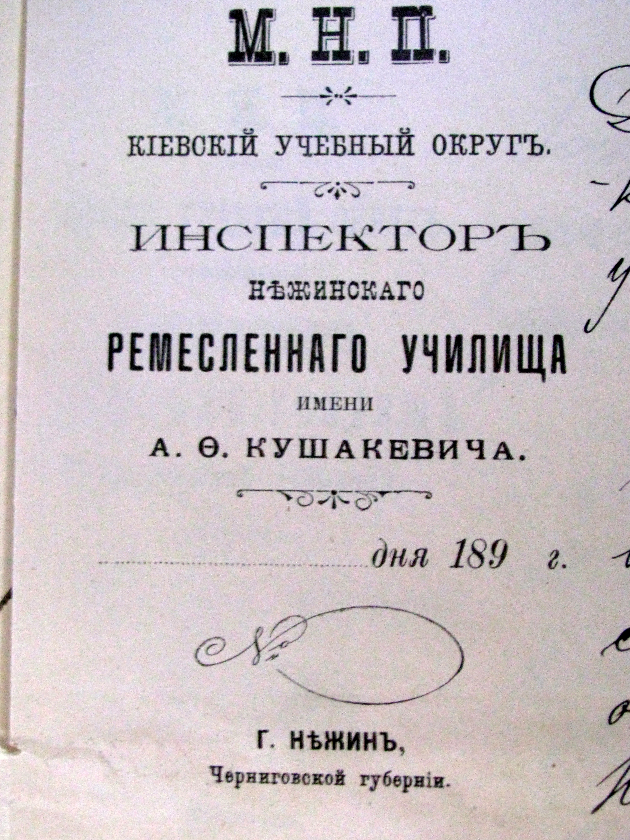 Штамп інспектора ремісничого училища